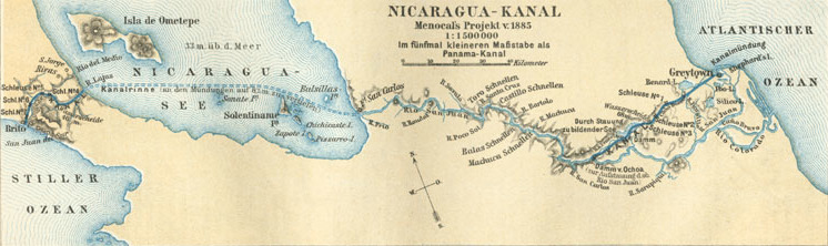 Panama-Kanal, unvollendeter Bau, 1 : 300 000 (oben); Nicaragua-Kanal, Menocal’s Projekt v. 1885, 1 : 1 500 000 (unten)